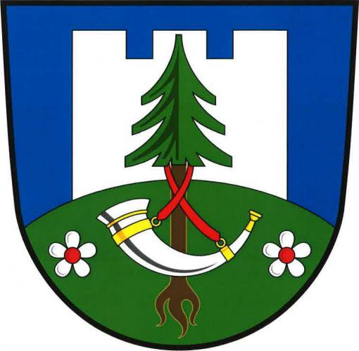 znak, Žampach, okres Ústí nad Orlicí